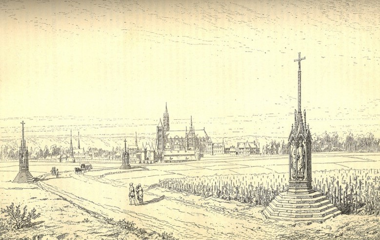 Les montjoies de Paris à Saint-Denis d'après les restitutions du maréchal d'Uxelles au XVIIe siècle.